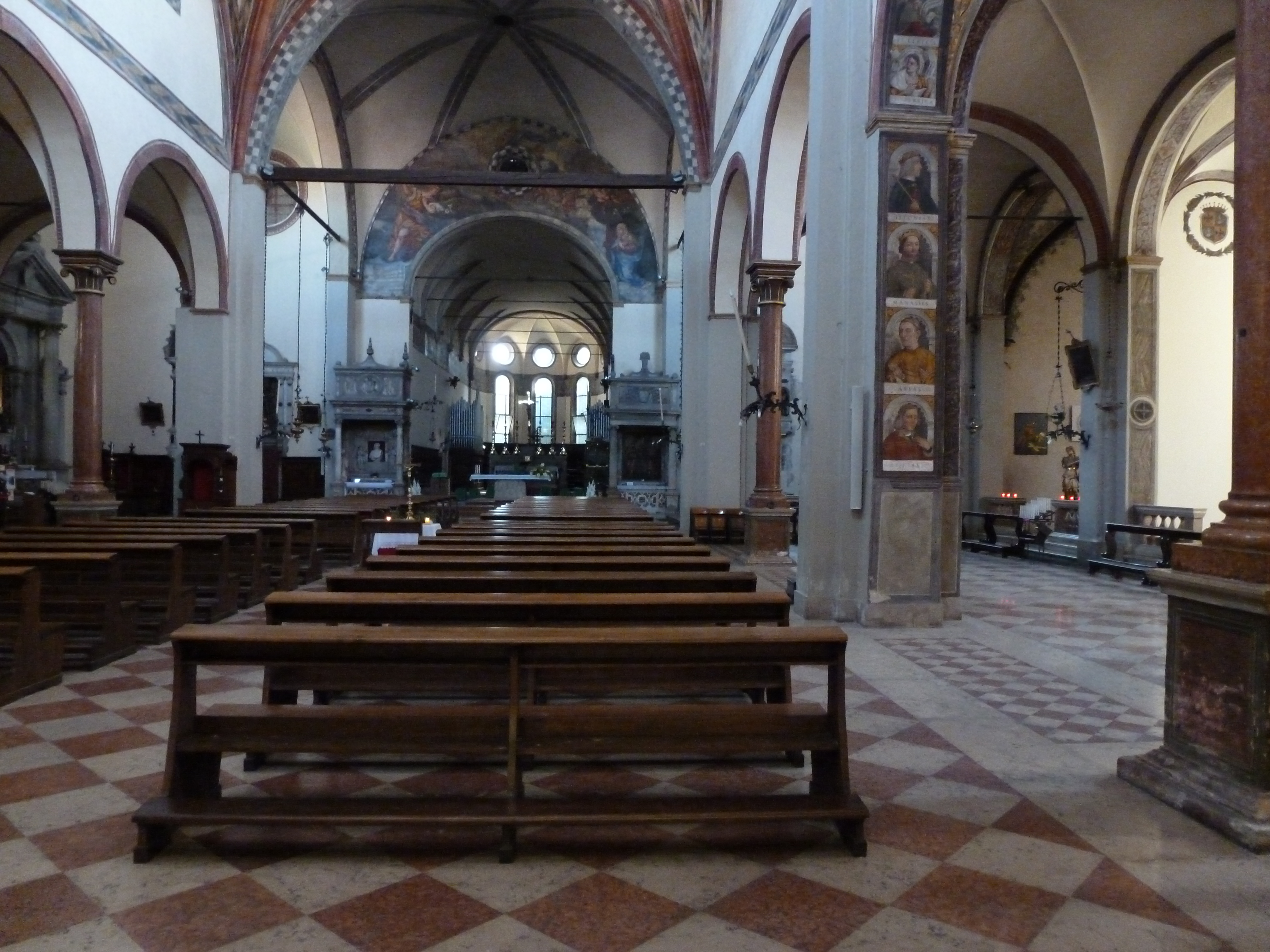 vista della navata. sulla destra si vede il quadro di san francesco in lontananza.